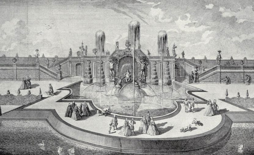 "Perspectivischer Auffzug einiger Stücken, als die Fontaine Thetis, deß Amphitheatri, der Orangerie und der zwischen 6 Pavillon gelegenen Wasserreichen großen Cascaden, beyde Flüsse den Rhein und Mayn darstellend" - Detailansicht der Thetis-Grotte der Favorite nach einem Stich von Salomon Kleiner, 1726